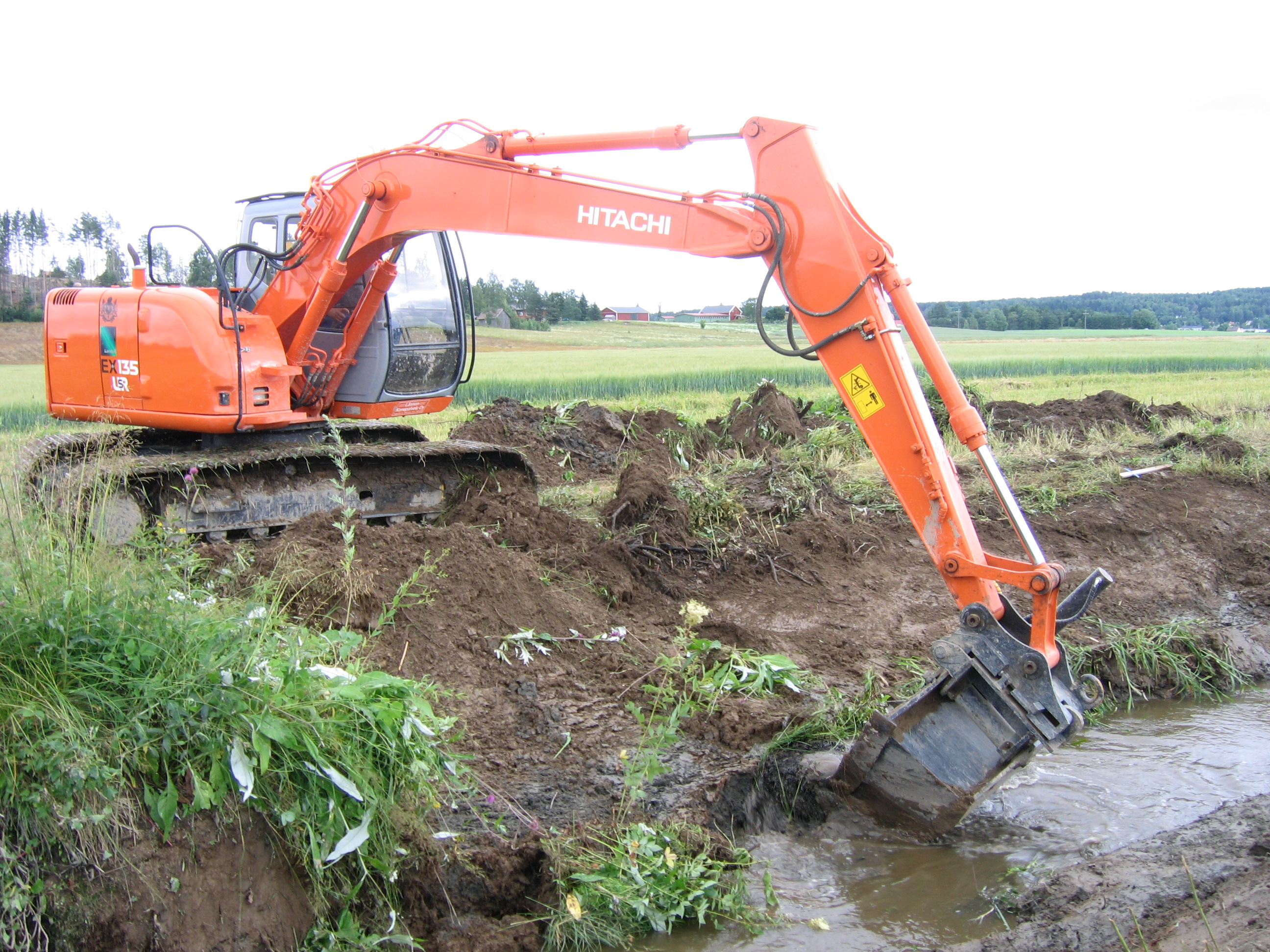 Juottimenoja